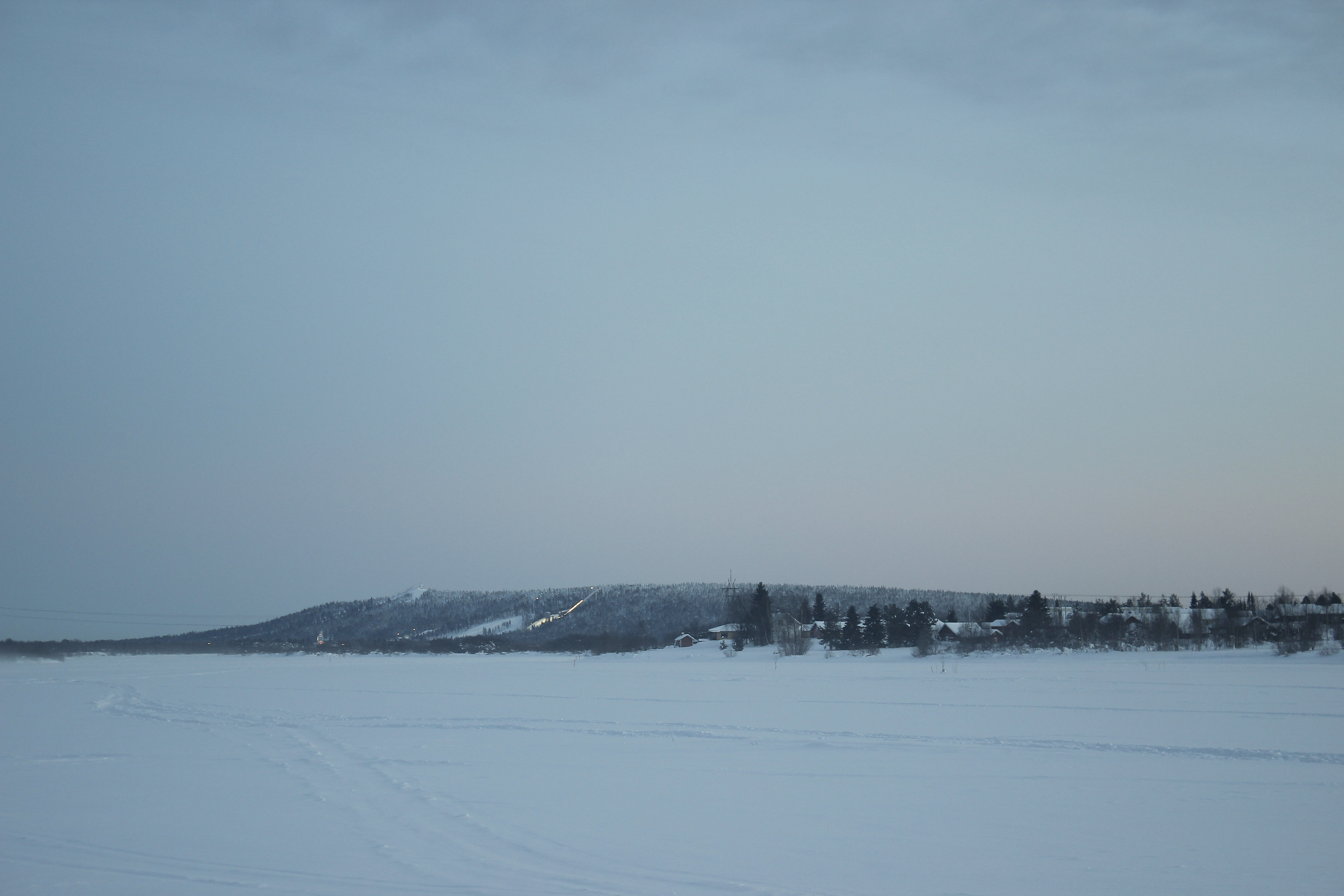 Ounasvaara talvella 2015